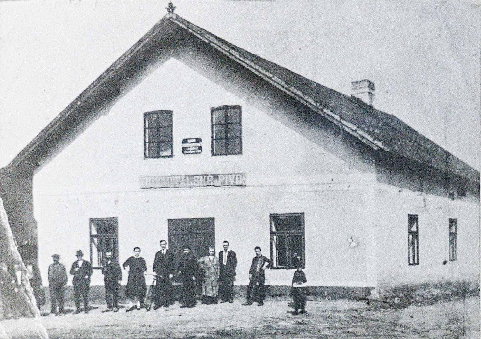 Hostinec Jana Kuníka, čp. 15, na návsi Zadní Zaběhlá